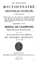 premiera pagina dau diccionari dEsteve Garcin